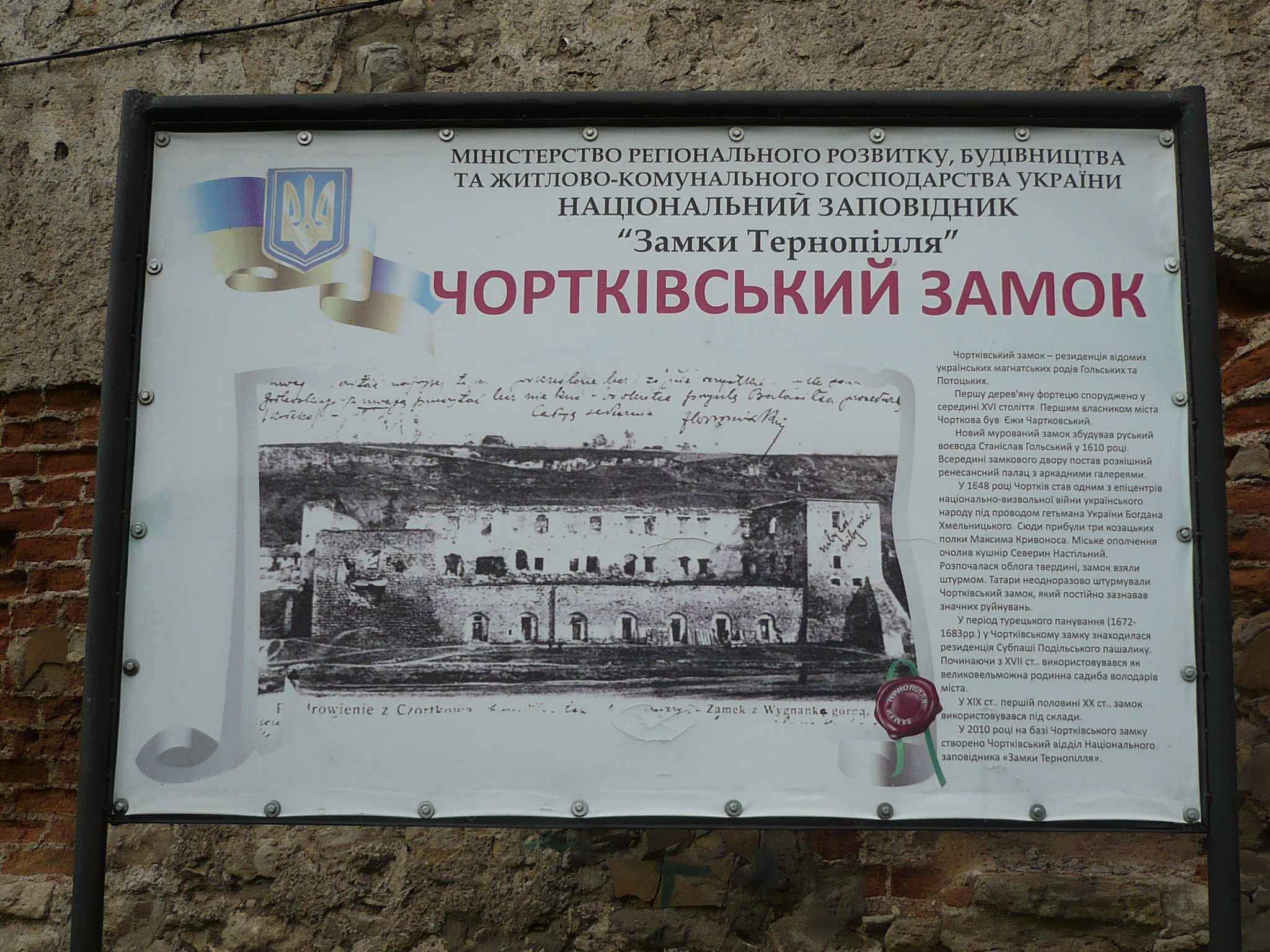 Czortków. Zamek